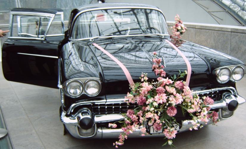 Es entstand auf der AMI 2005, die im April stattfand. Dieser Cadillac Fleetwood stand in der Eingangshalle der Leipziger Messe. Dieses Auto wird für Hochzeiten häufig vermietet